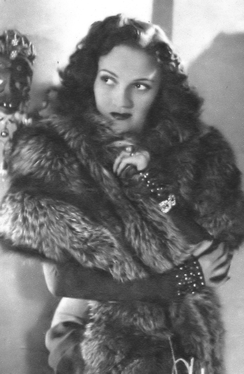 Blackie en 1946, cuando actuaba en el teatro de revistas junto a Pepe Arias.